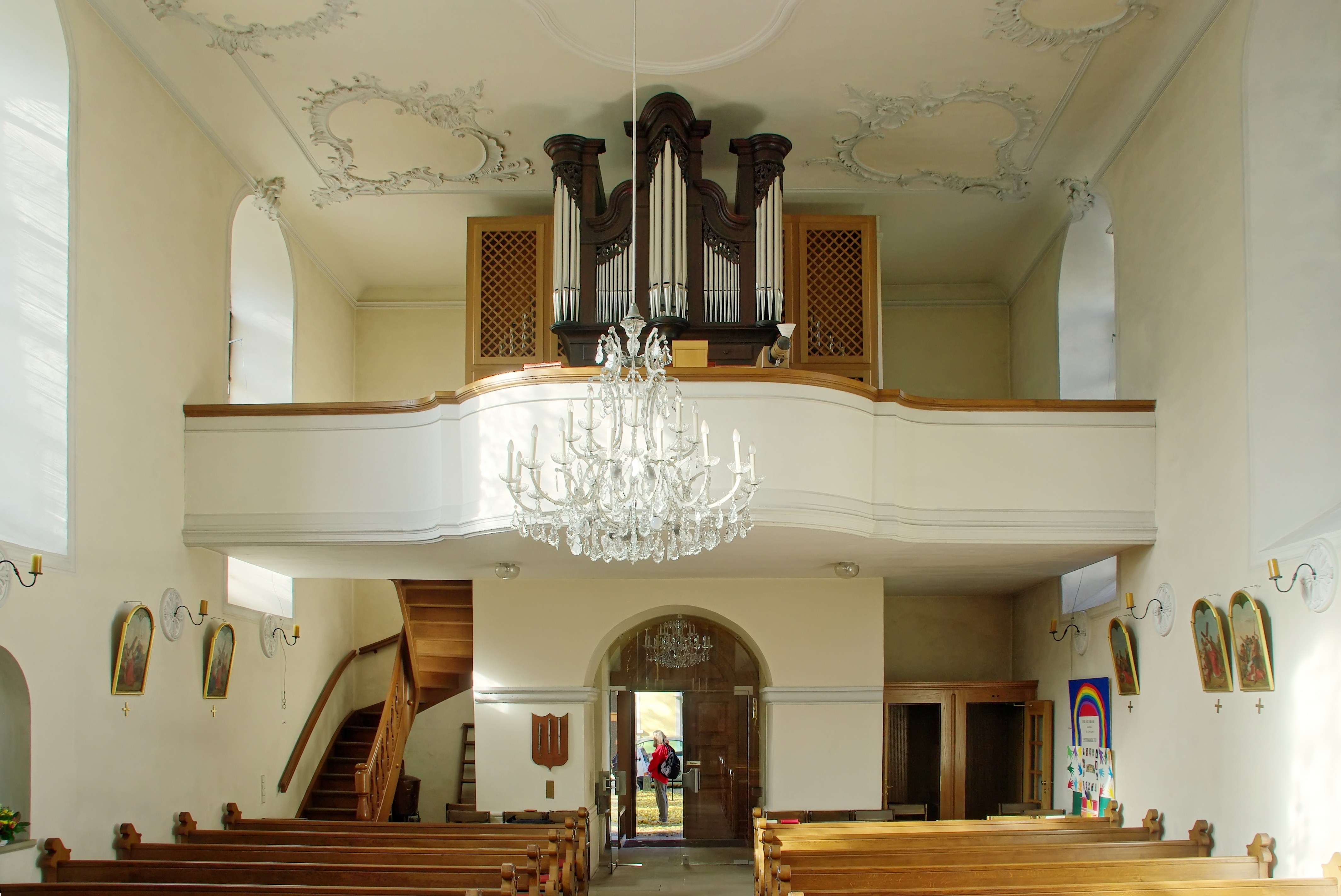 St. Cyriak und Perpetua ist eine kleine Kirche auf dem Annaplatz in Freiburg, deswegen wird sie auch das Anna-Kirchle genannt